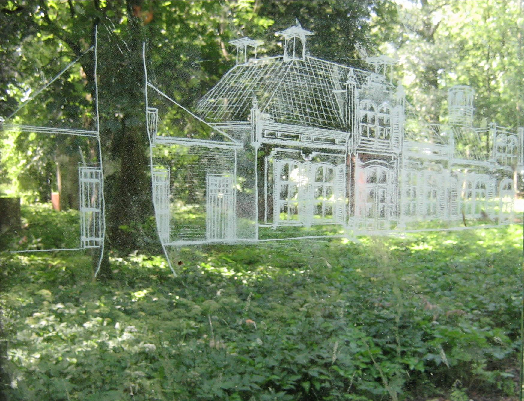 Architectenbureau Kijlstra & Brouwer,2009